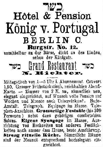 Anzeige des (ehemaligen) Berliner Hotels "König von Portugal" im Berliner Adressbuch, 1885.